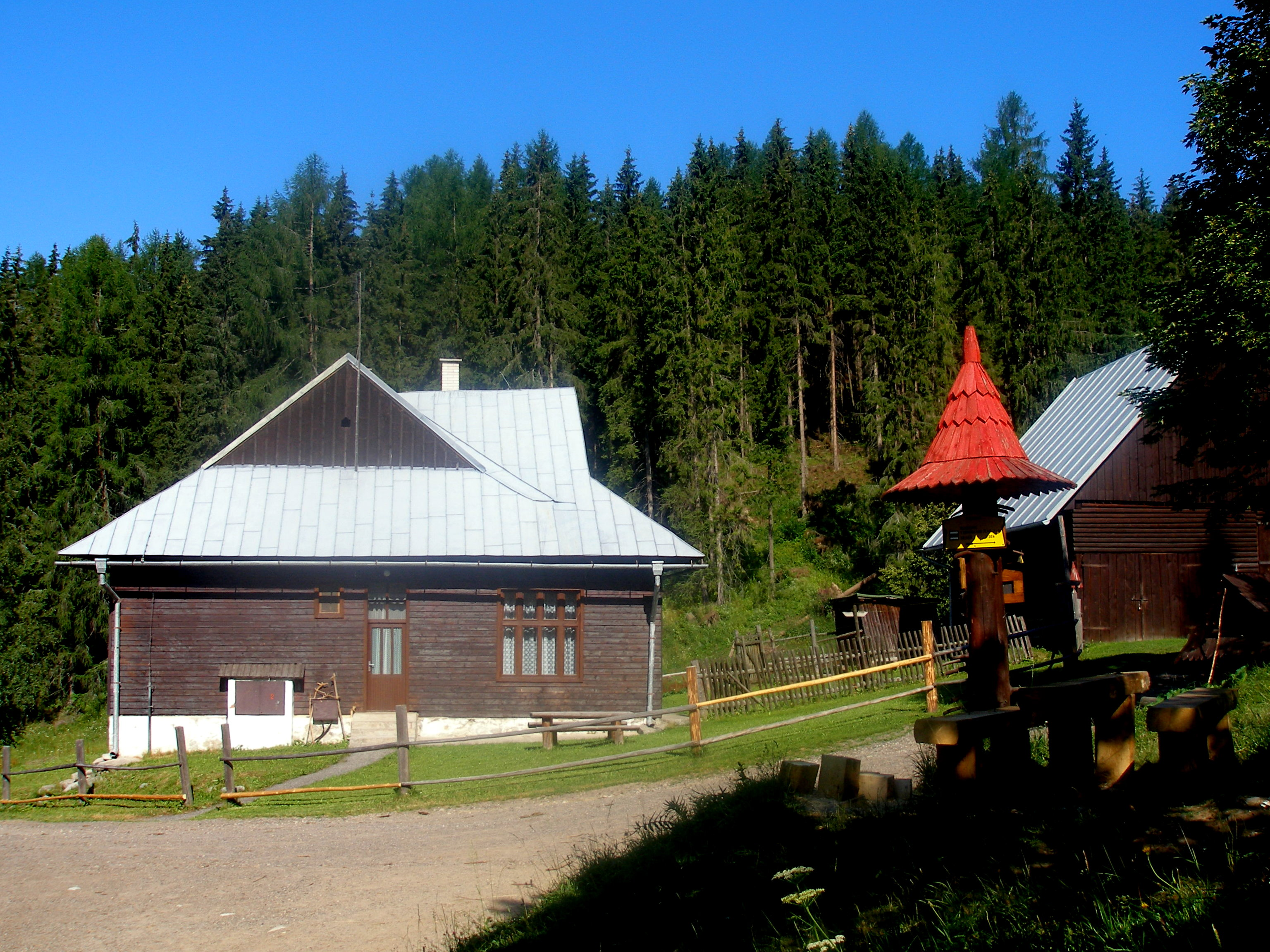 Osada Podbanské Tri studničky